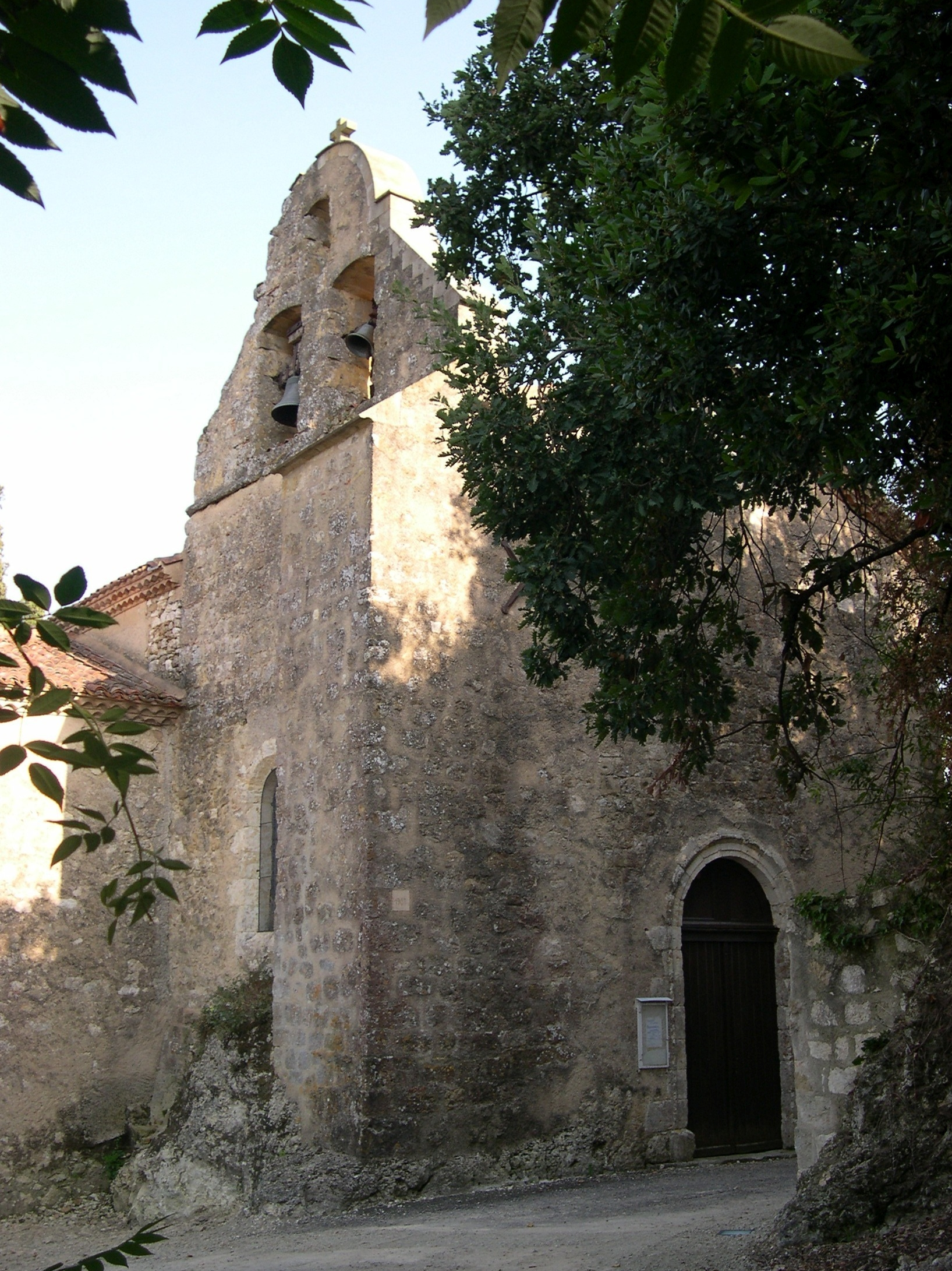 Église Saint-Jean-Baptiste de Castillon-Massas